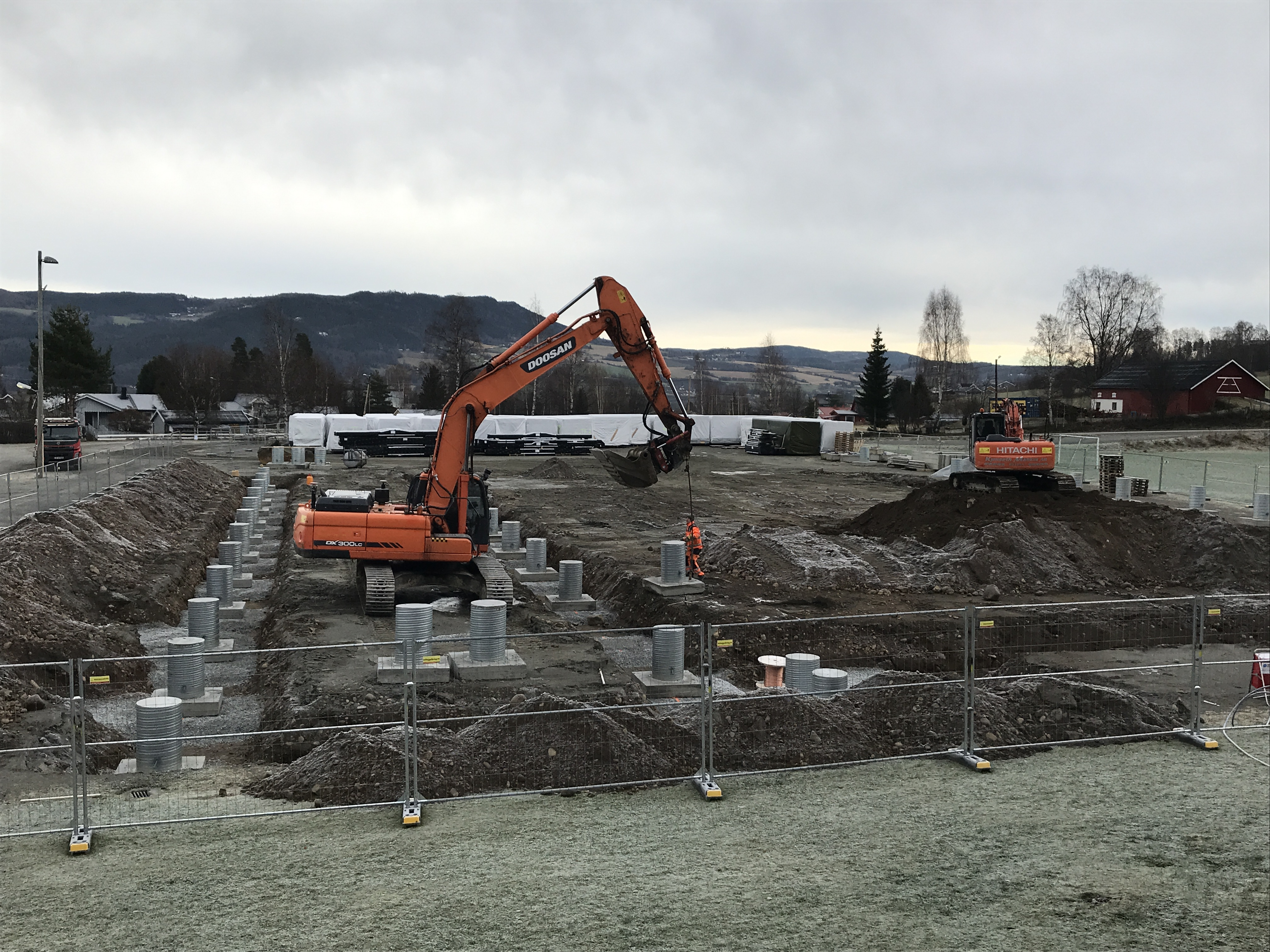 Biri flerbrukshall begynte å bygges i november 2017.